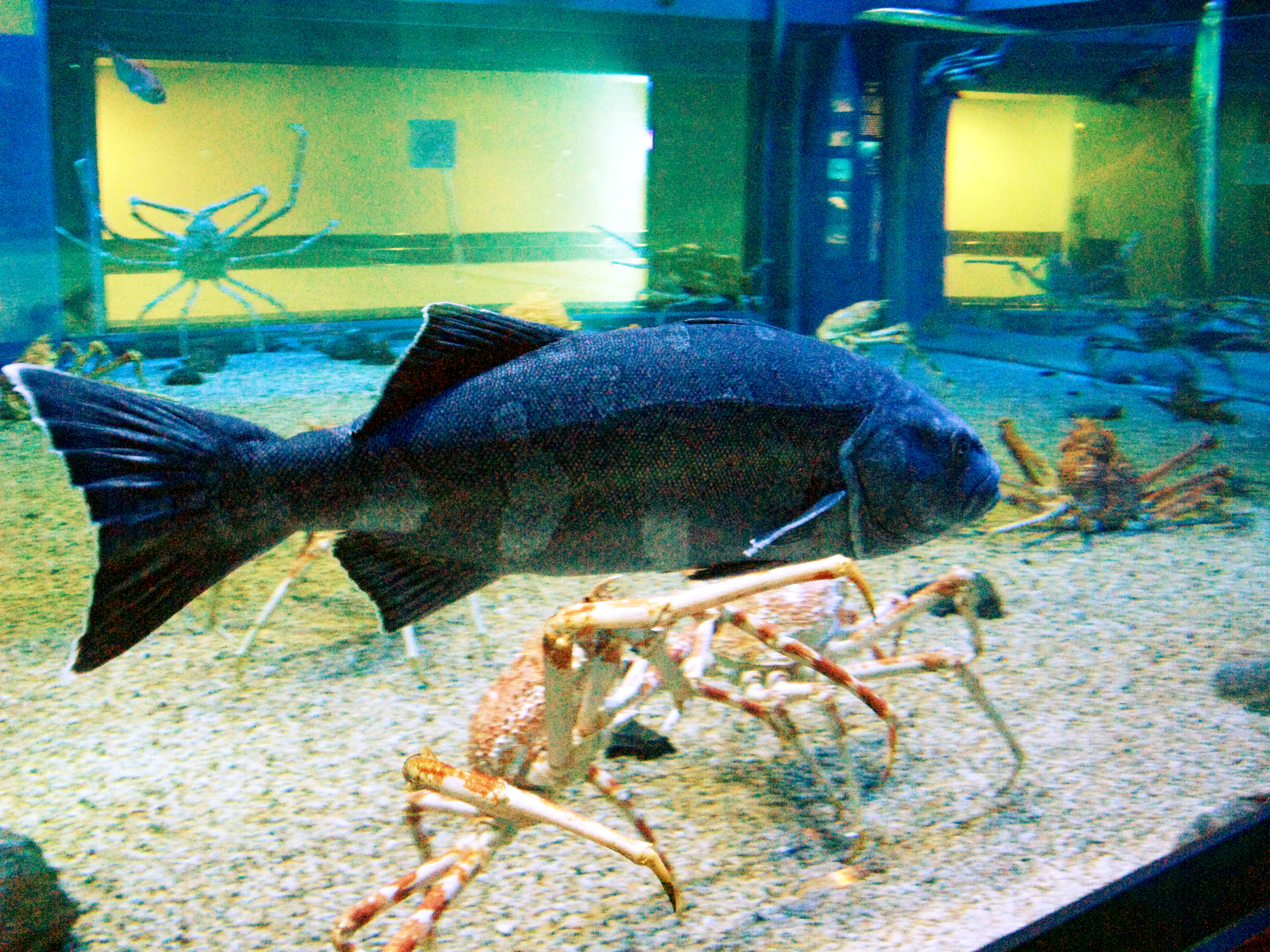 Scientific name Erilepis zonifer